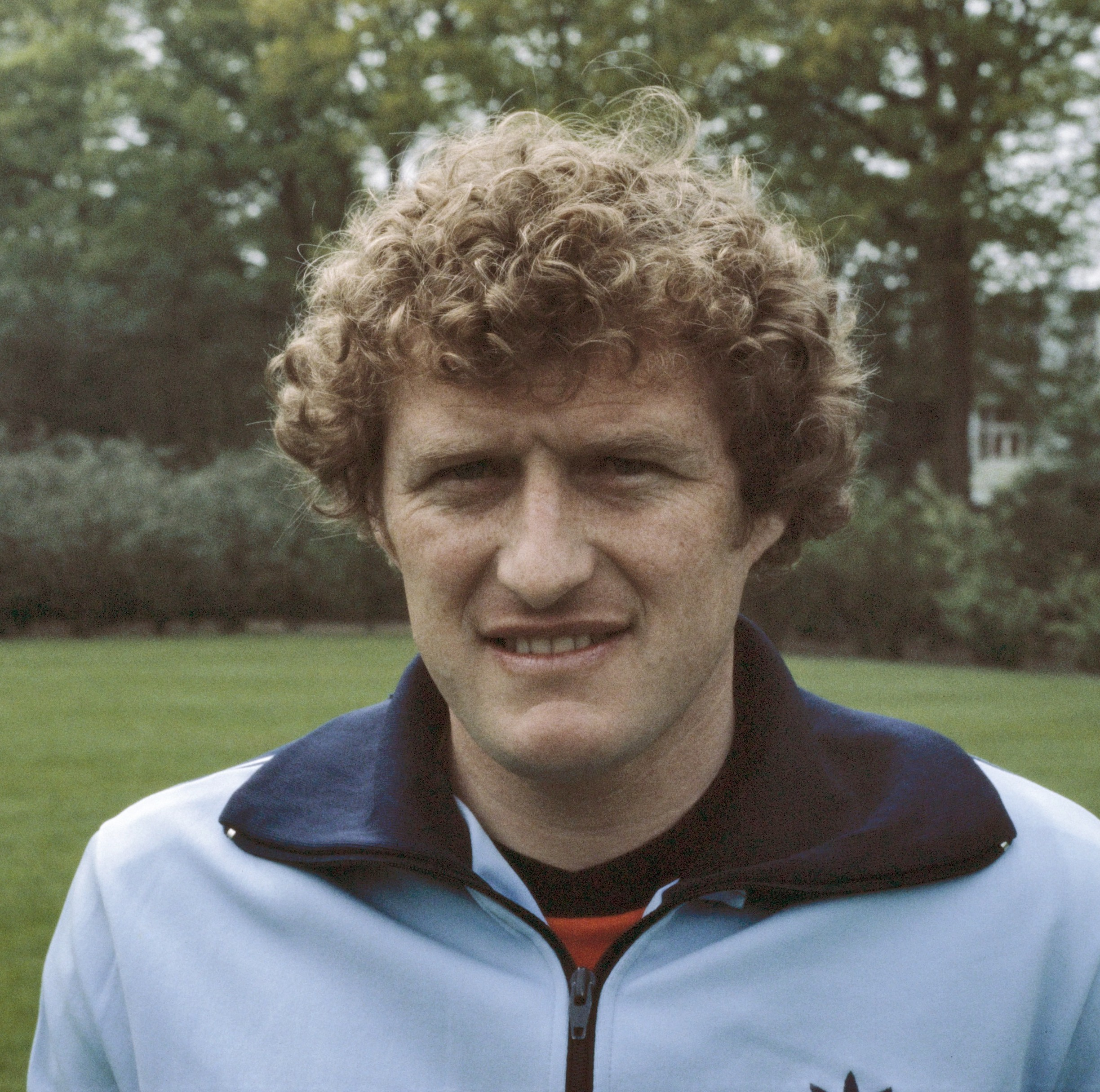 Spelers van de selectie voor de Wereldkampioenschappen voetbal in Argentinië. Wim Jansen